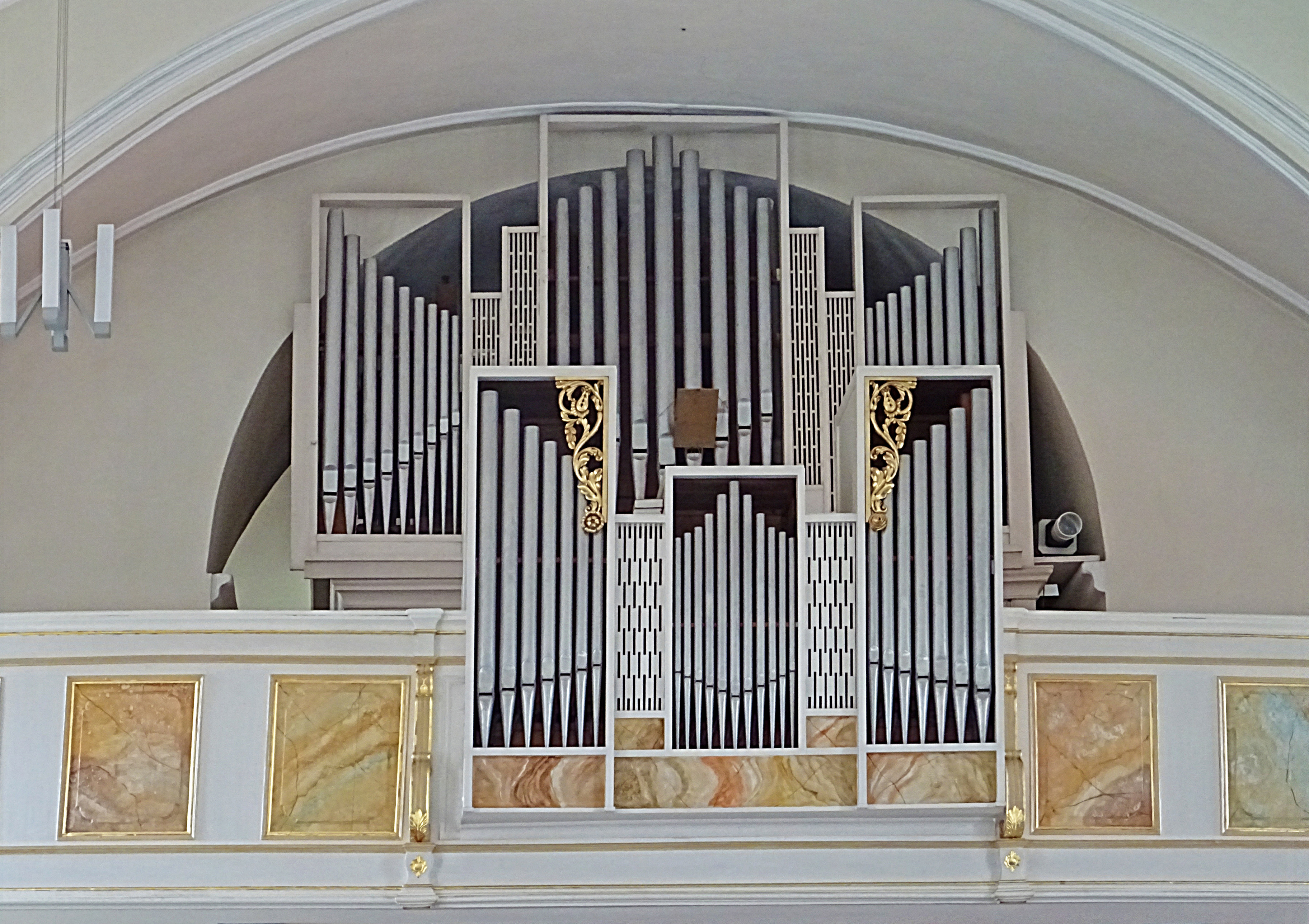 Die Orgel von Simon Frankenberg (1796) wurde durch Robert Knauf & Sohn (ca. 1878) und Rudolf Kühn (1966 IIP/19) umgebaut.[1]